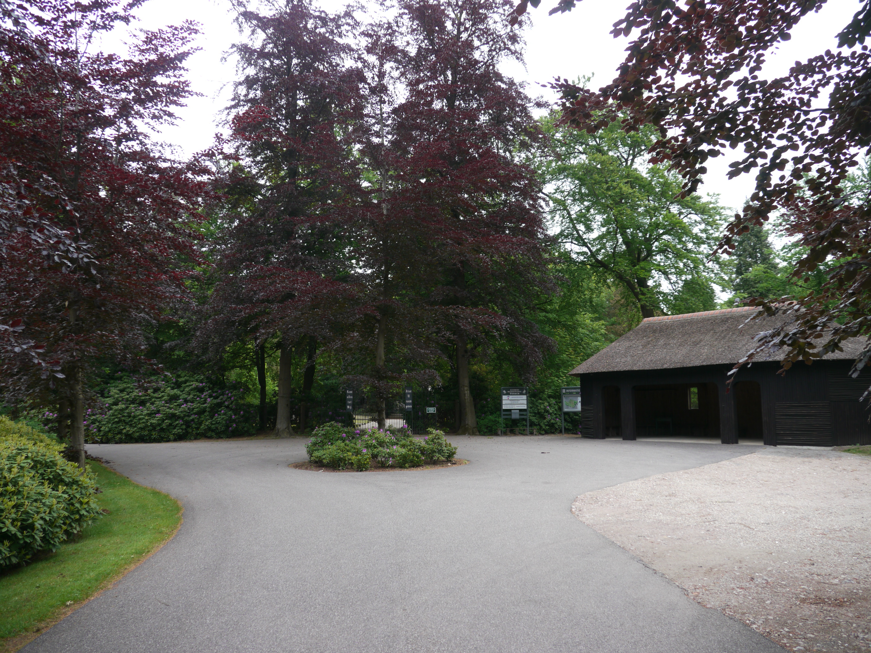 Entree van de begraafplaats in Vorden.